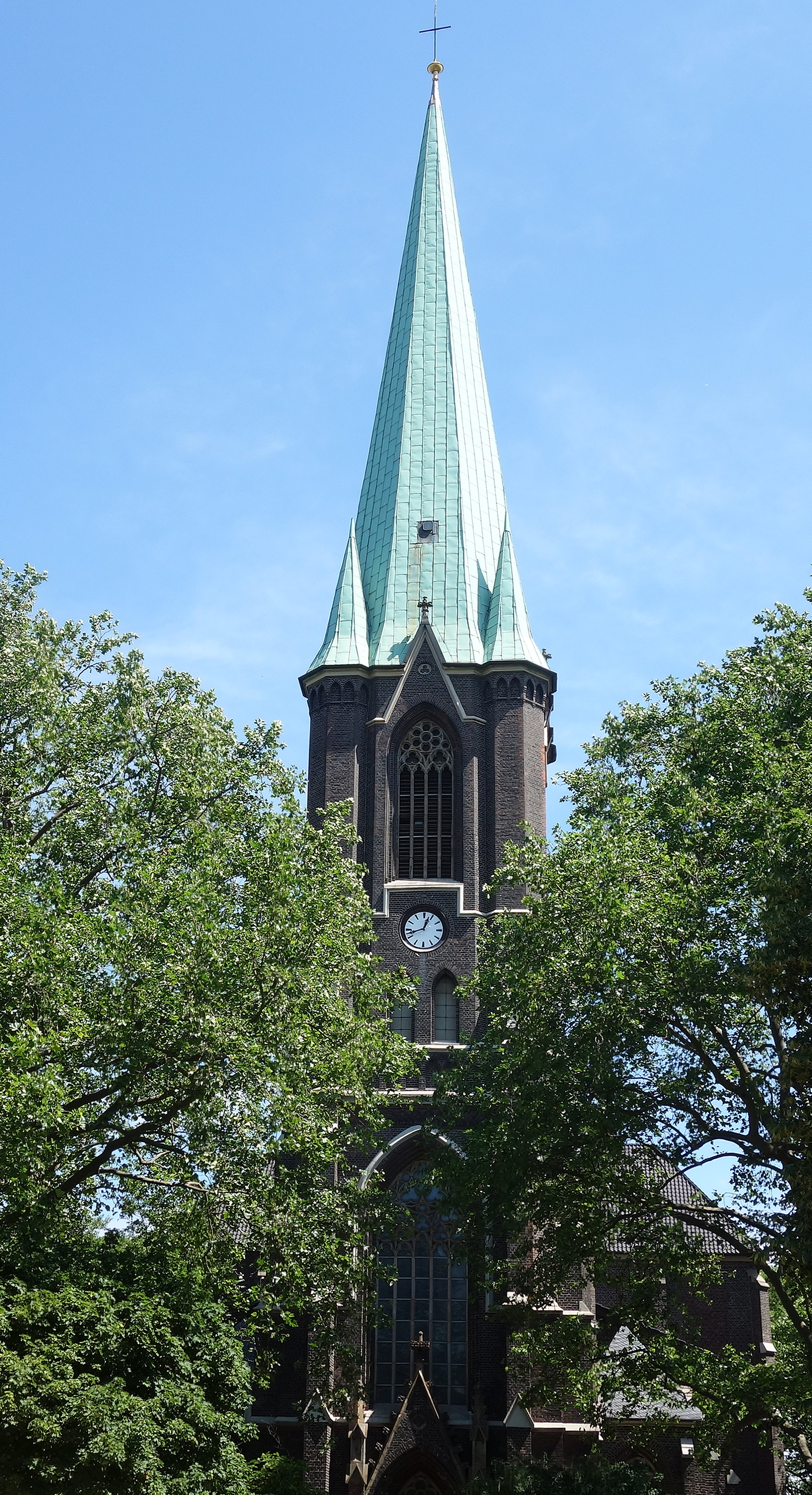 Kirchturm der Norbertuskirche in Duisburg-Obermarxloh